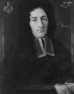 Gemälde in der Tübinger Professorengalerie